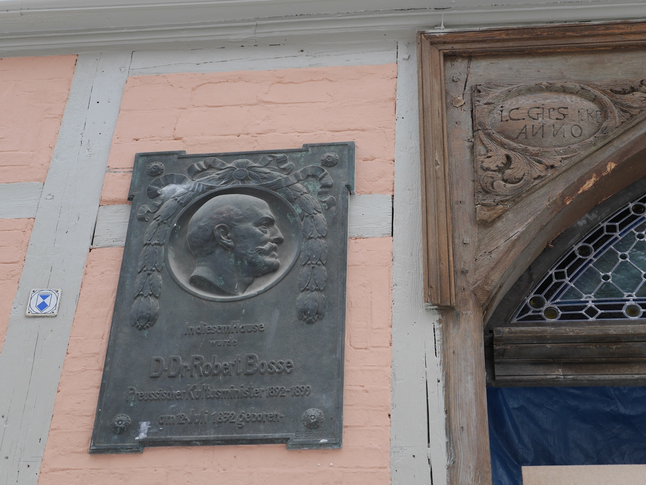 Gedenktafel Robert Bosse an dessen Geburtshaus Klink 10 in Quedlinburg